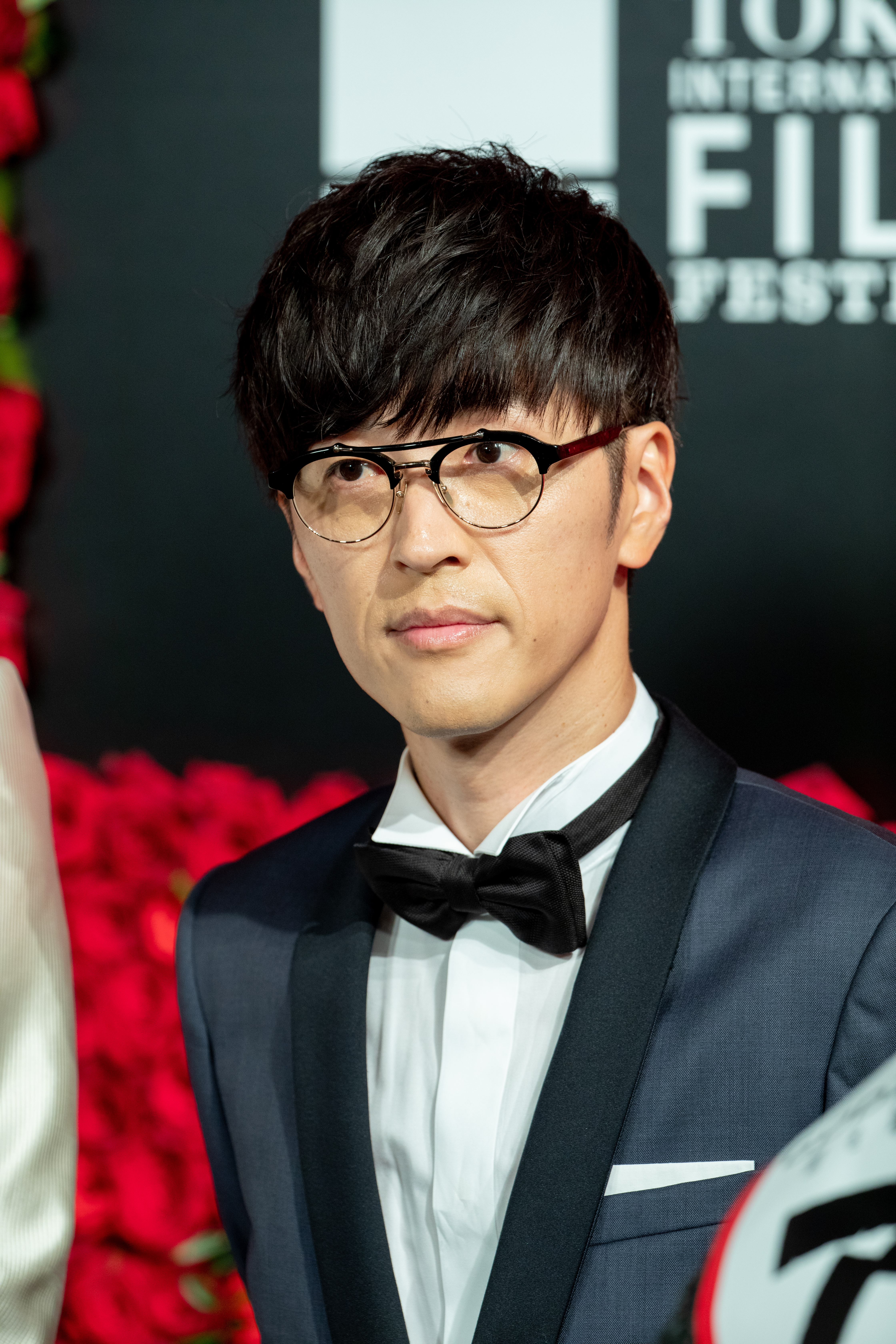 第30回 東京国際映画祭 オープニングセレモニー 櫻井孝宏 (GODZILLA 星を喰う者)